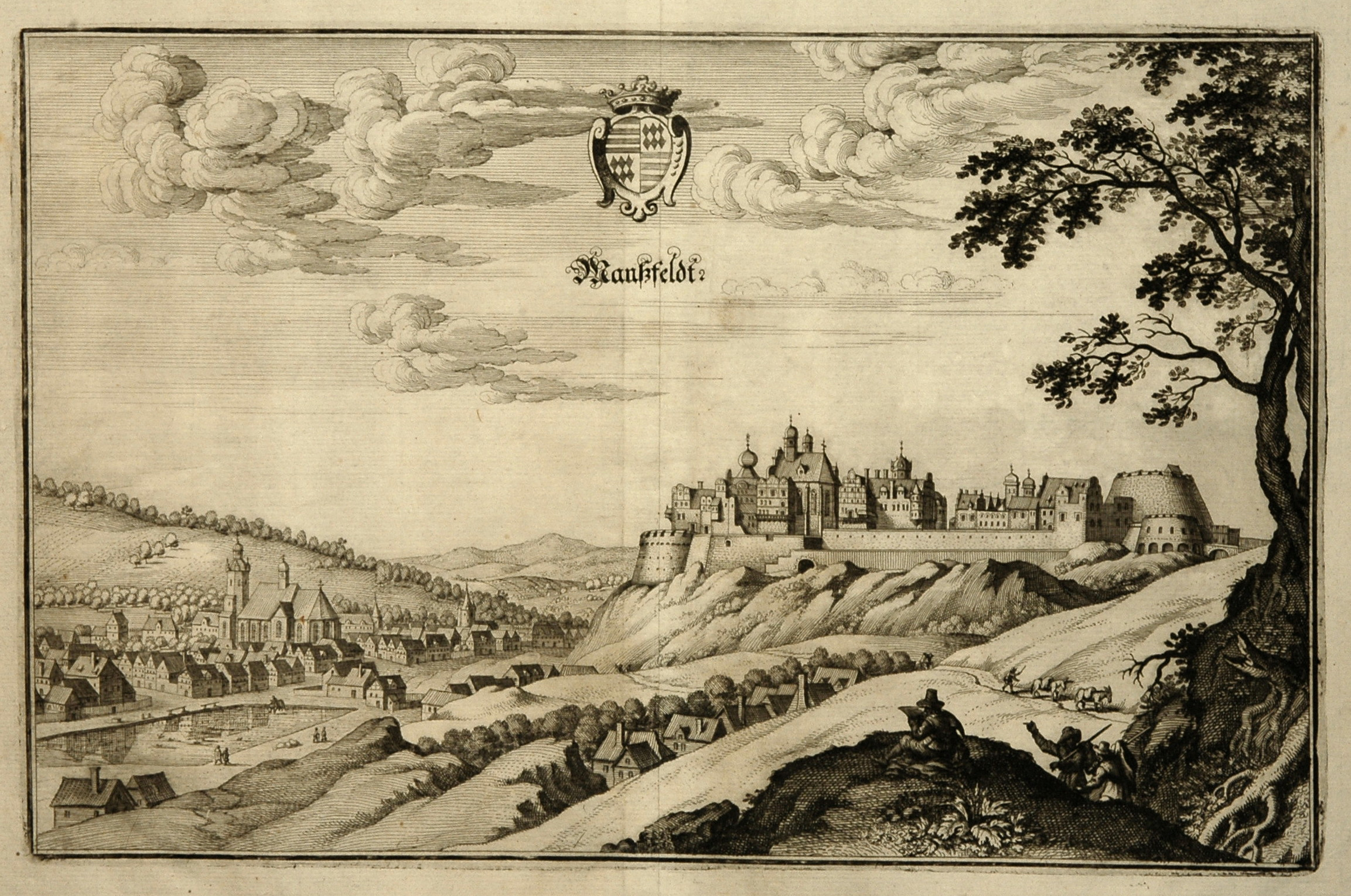 Kupferstich 21 x 32cm um 1650